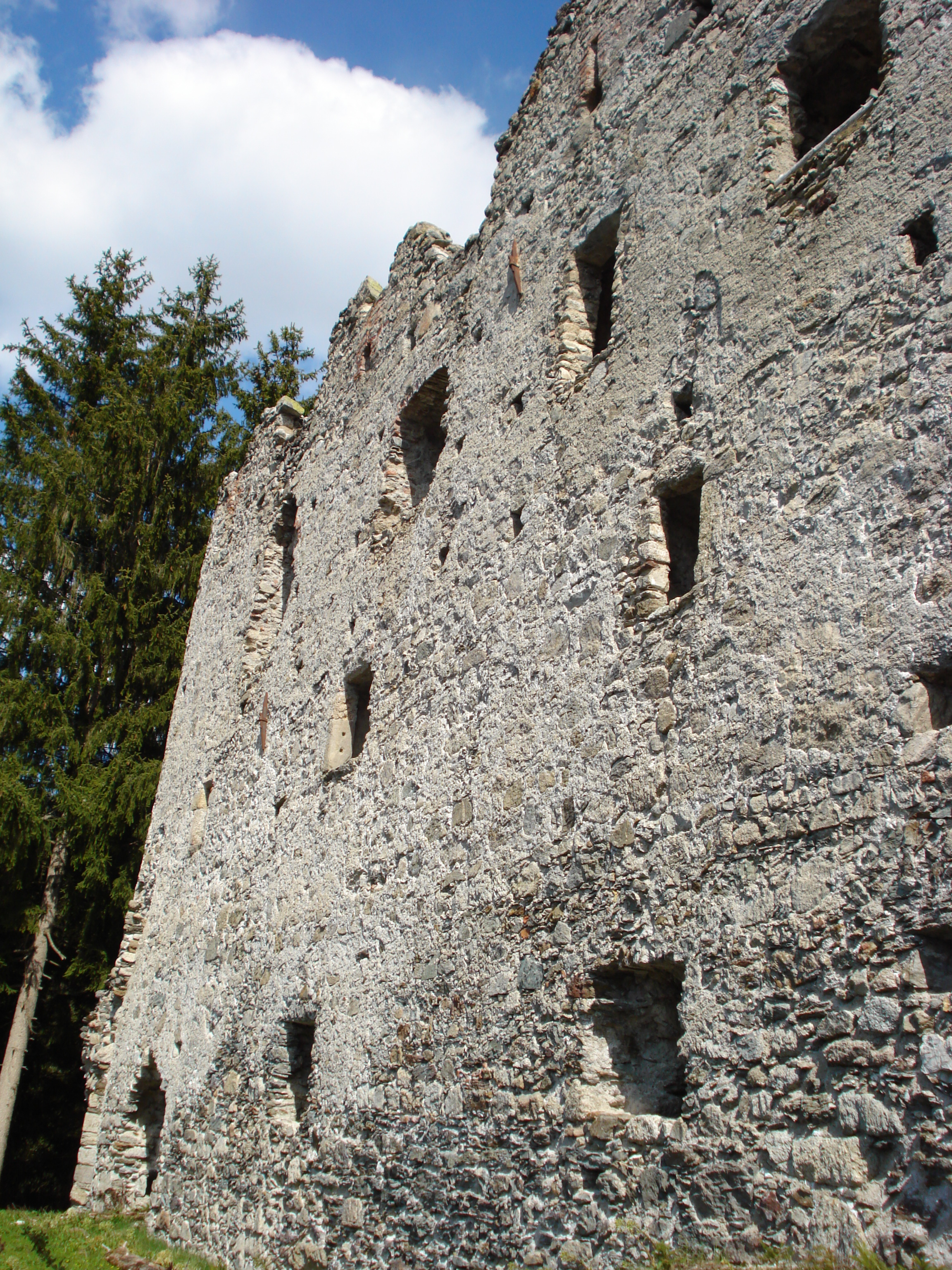 Deitsch: Ruine Altrasen in der Gemeinde Rasen-Antholz - ehemals Sitz des Gerichts Altrasen